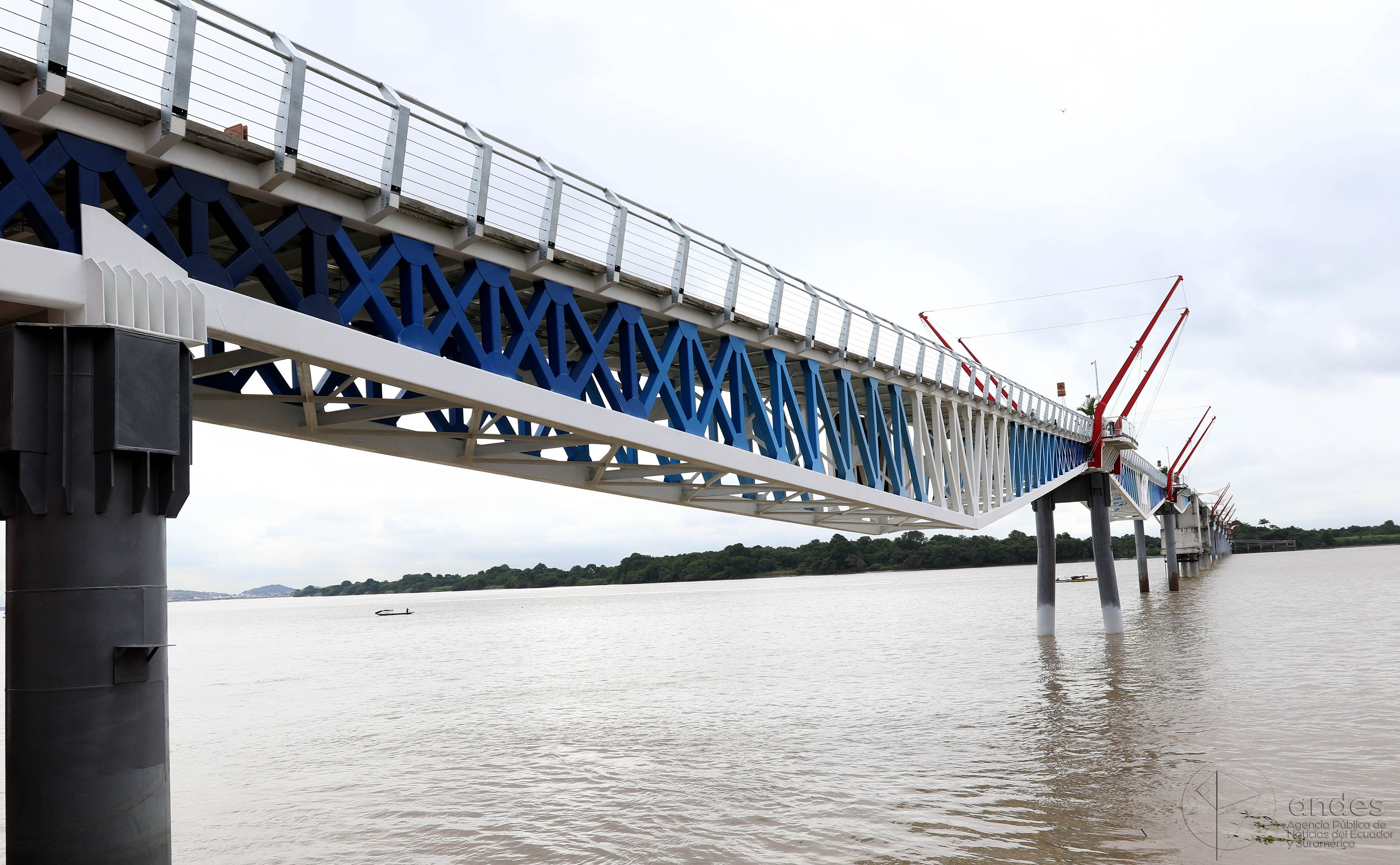 Guayaquil, jueves 21 de junio del 2018 (Andes).-Esta mañana se habilitó el tramo del puente que une a Guayaquil con la Isla Santay. Foto:César Muñoz/Andes Guayaquil, jueves 21 de junio del 2018 (Andes).-Esta mañana se habilitó el tramo del puente que une a Guayaquil con la Isla Santay. Foto:César Muñoz/Andes